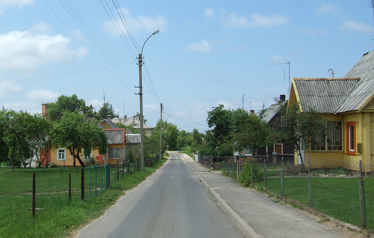 Pašto gatvė Švenčionėliuose